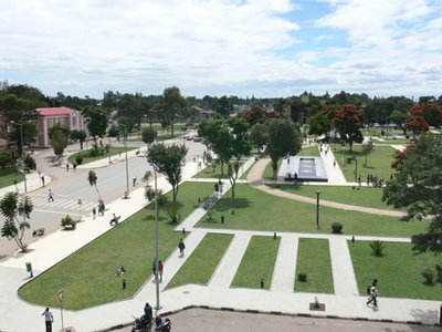 Jardim da Cultura This is an image from Angola